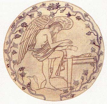 Création personnelle Floreal